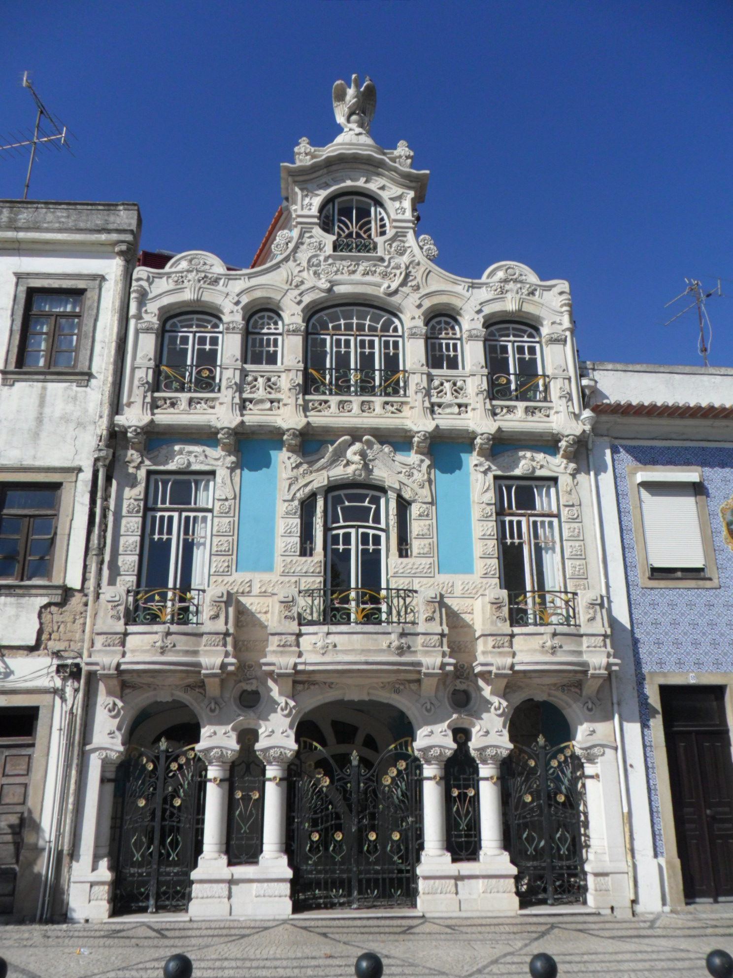 arte nova This file was uploaded for Wiki Loves Monuments in Portugal with the unique identifier 74836.